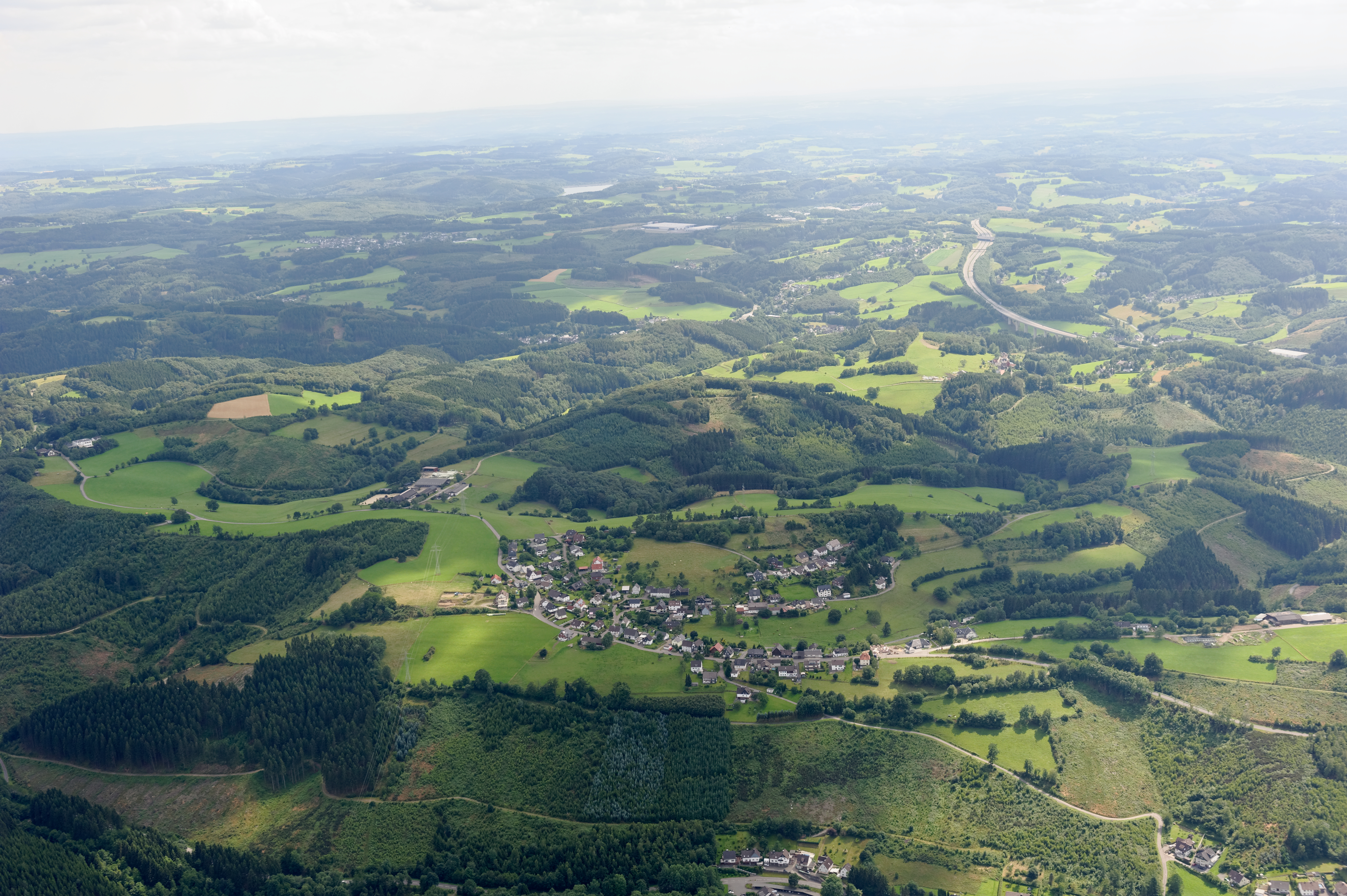 Fotoflug Sauerland West. Bergneustadt-Baldenberg, Blick weit nach Süden. The making of this document was supported by the Community-Budget of Wikimedia Germany.